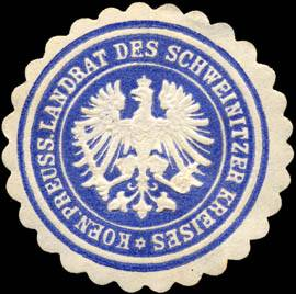 Sealing stamp Title: Koeniglich Preussicher Landrat des Schweinitzer Kreises Description: geprägt, blau, weiss Place: Schweinitz size: 3 cm